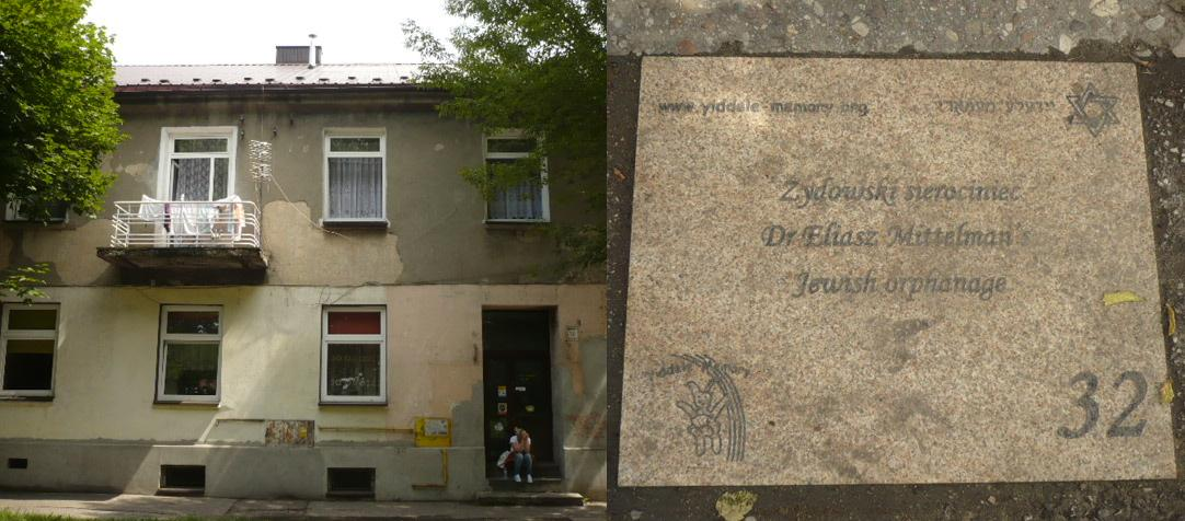 Radomsko. Otwarte Muzeum Żydowskie 32